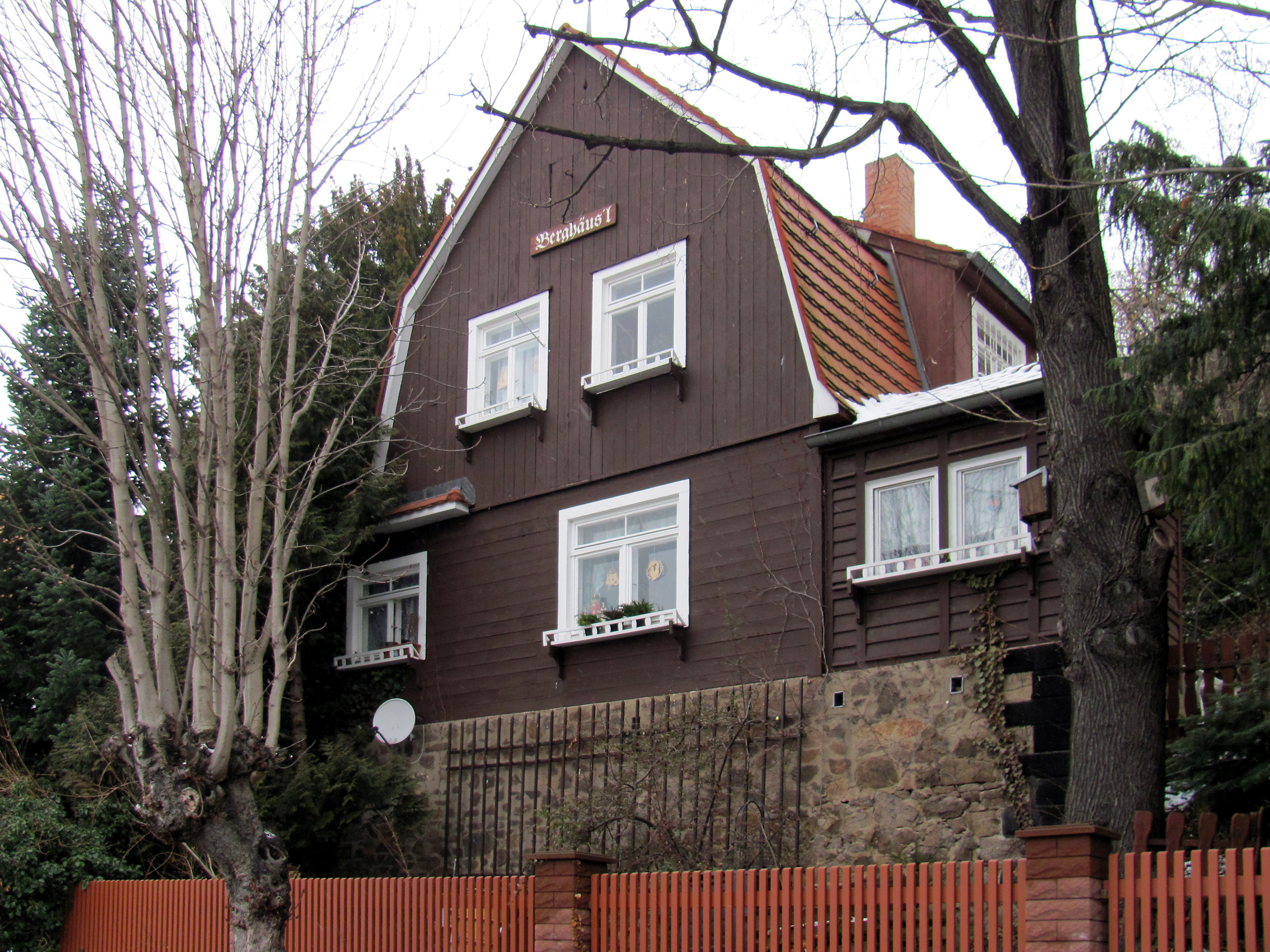 Radebeul, Berghäus’l